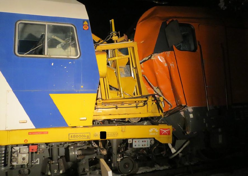 Am 27. März 2013 prallte der Pottendorfer Linie ein Güterzug von Rail Transport Service (RTS) frontal auf einen im Bahnhof Obereggendorf stehenden Gleismesswagen der ÖBB. Dabei wurden zwei der vier Mitarbeiter, die sich im Gleismesswagen befanden, getötet. Vier Personen werden verletzt. Der Fahrdienstleiter hatte die Fahrstraße nicht überprüft und dem Güterzug die Einfahrt auf das besetzte Gleis ermöglicht.